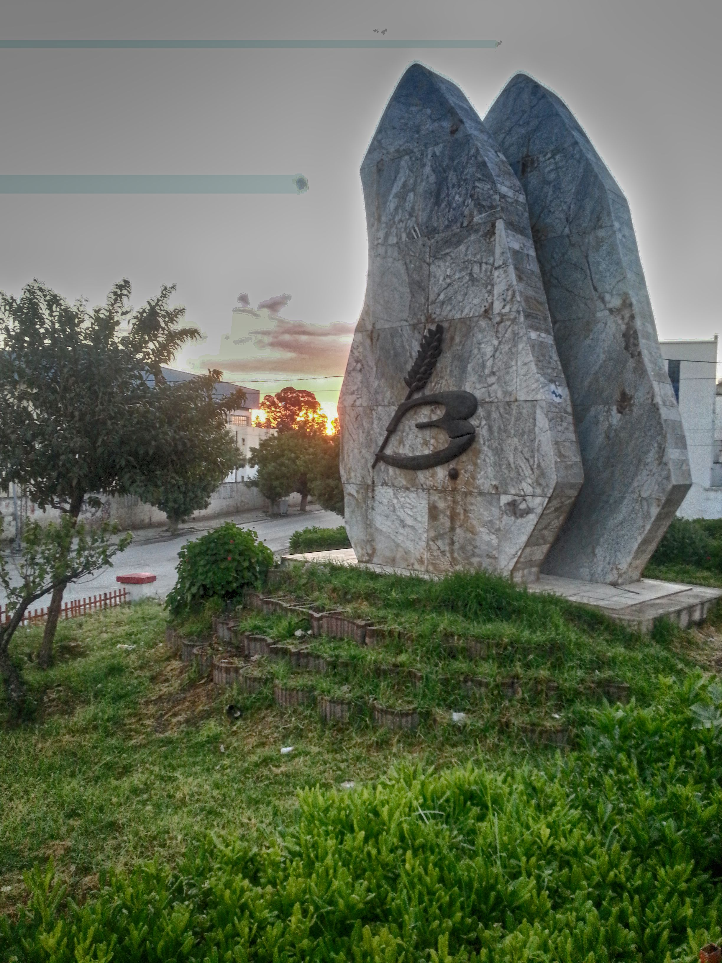 Une place dans la ville de Béja